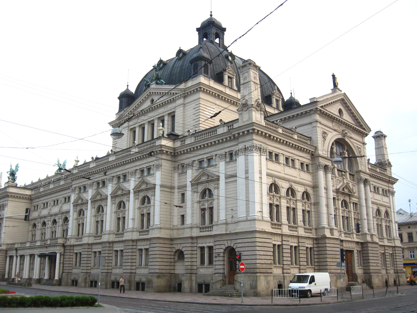 Lviv opera